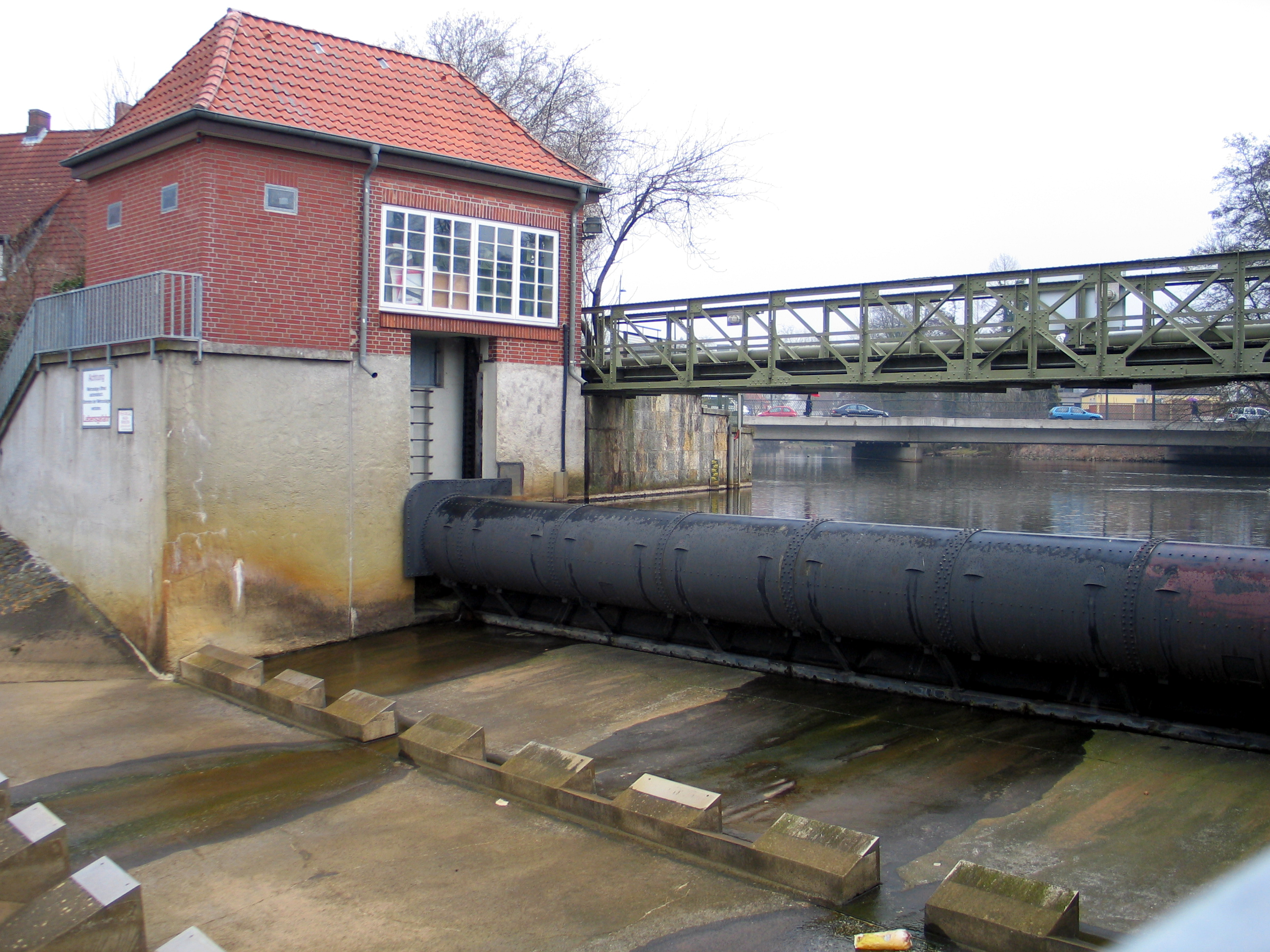 Als die Walzenwehr-Anlage in Celle 1994-96 sanierte werden mußte, wurde unter anderem das Tosbecken sowie die Zahnschwellen neu vergossen. Auf diesem Foto vom Stauwärterhaus in Richtung Maschinenhaus ist im Hintergrund die sogenannte B3-Allerbrücke zu erkennen ...